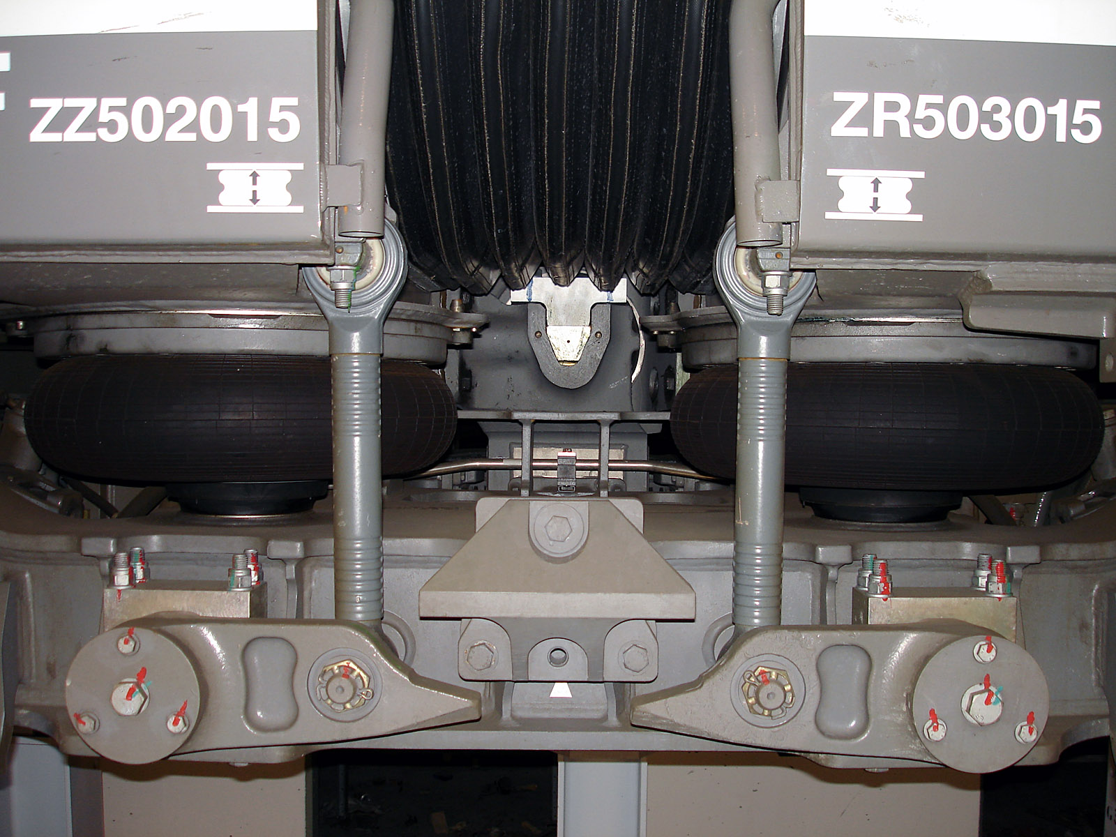 Vue extérieure de l'intercirculation d'une Z 50000 au technicentre Paris Nord-Joncherolles, Villetaneuse, Seine-Saint-Denis, France.